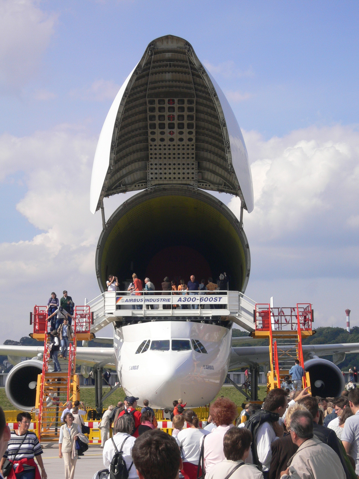 Airbus Beluga con la puerta del compartimiento de carga abierta Airbus A300-600ST Beluga with opened freight area Picture taken at Airbus "Familientag" in Hamburg, Germany on 27.08.2005